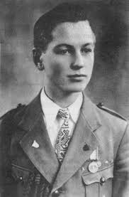 Jameikis prieš tremtį, 1941 m. birželio 16 d.